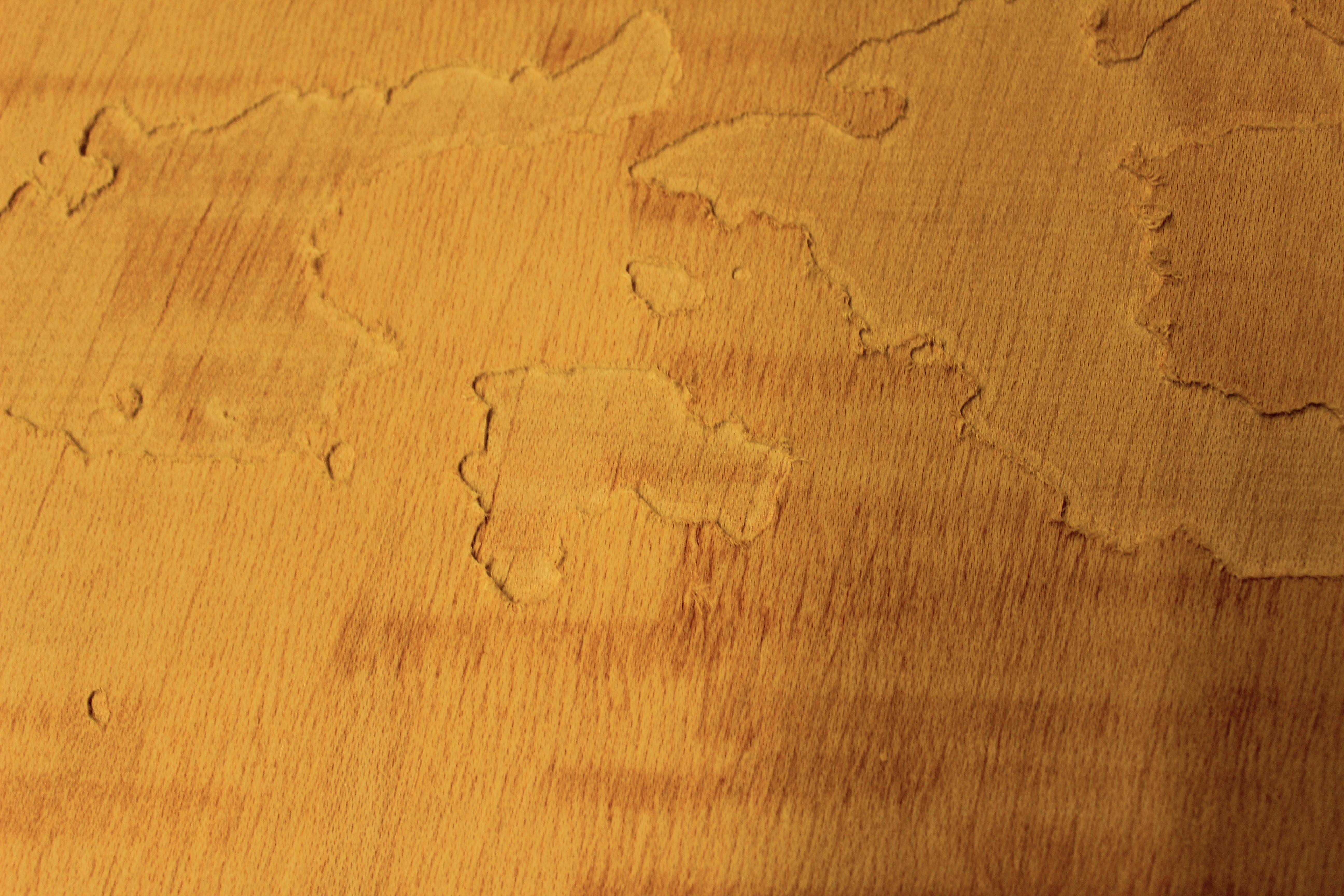 Das Bild zeigt einen Ausschnitt eines mit einer CNC-Maschine bearbeiteten Druckstocks. Der Druckstock ist eine Tischlerplatte furniert mit Gabun. Frästiefe ca. 1,5 mm, die Oberfläche muss noch geschliffen werden. Dann erfolgt das Einwalzen mit Druckfarbe und das Abdrucken auf Papier.